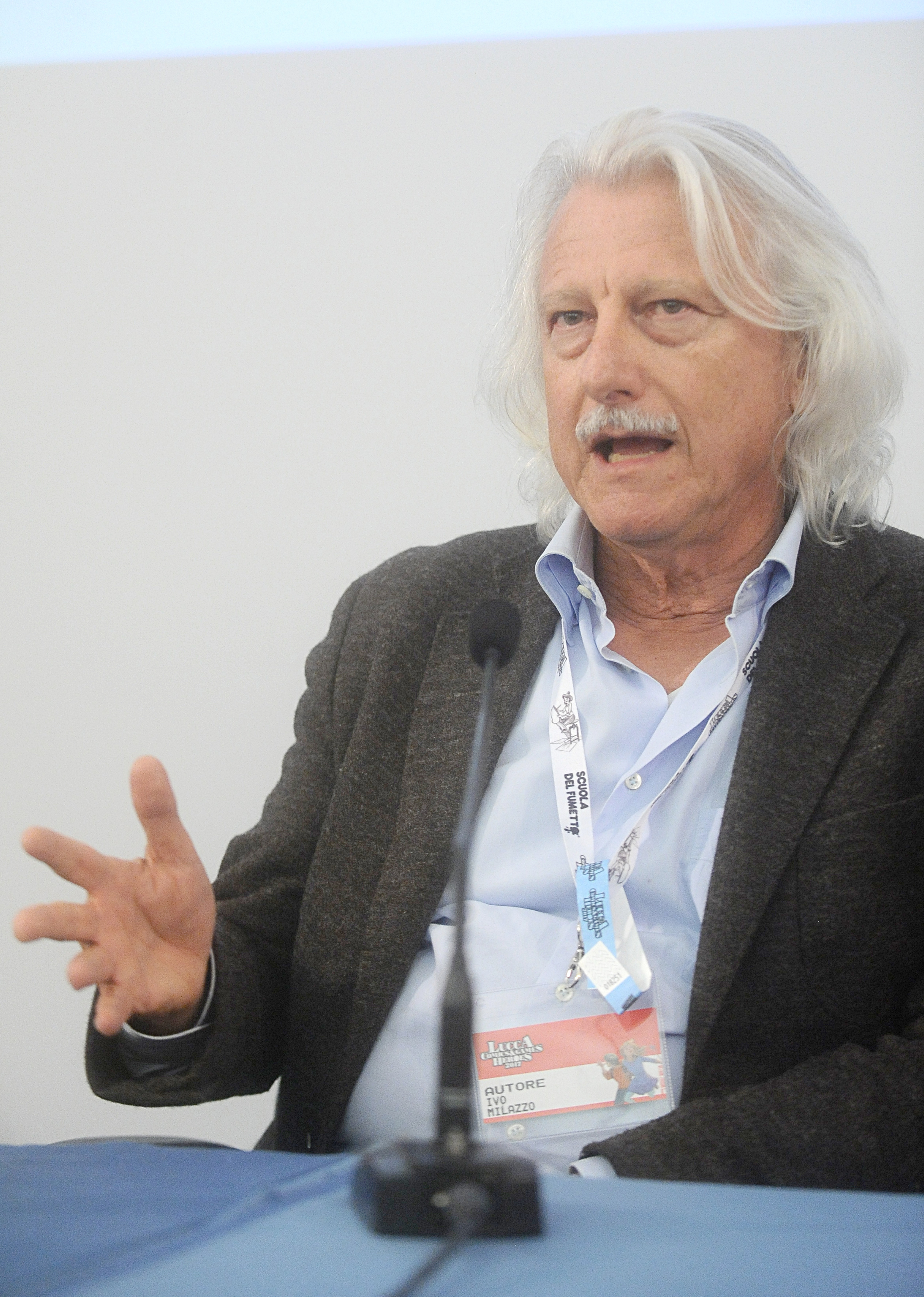 Ivo Milazzo. Auditorium Fond. Banca del Monte. Lucca.